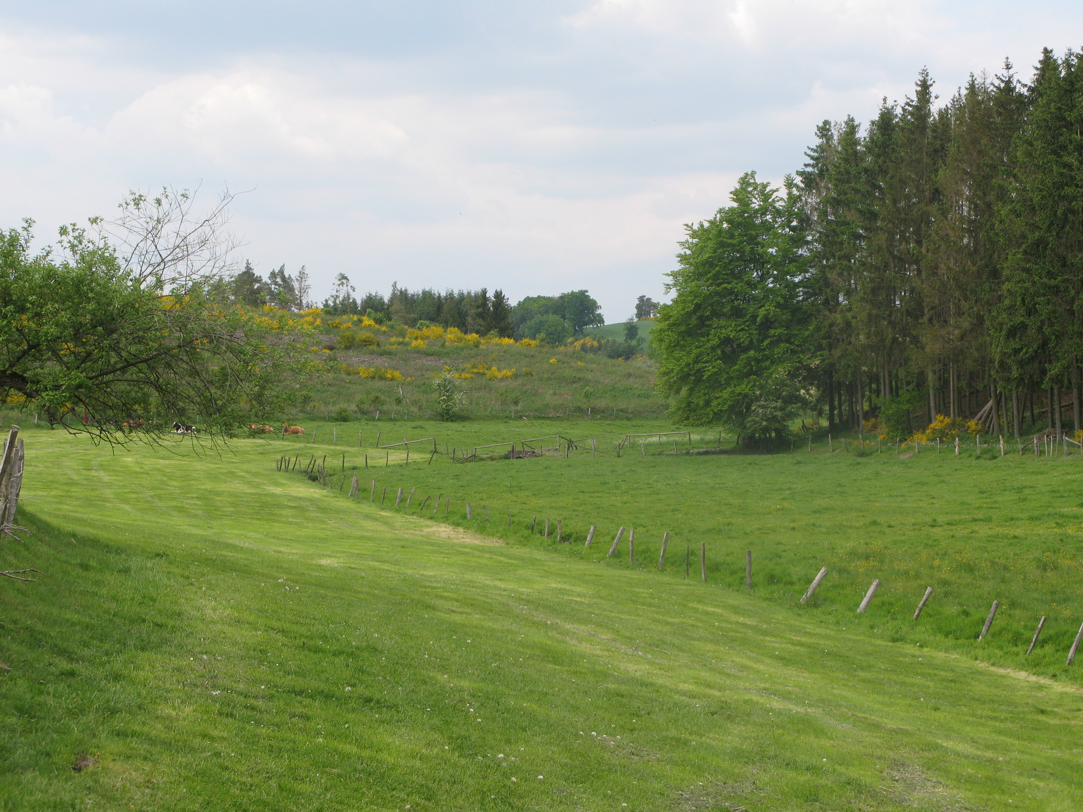 Den Dall vun der Wemperbaach bei Allerbuer vun der N20 aus gesinn. Kategorie:Baachen zu Lëtzebuerg